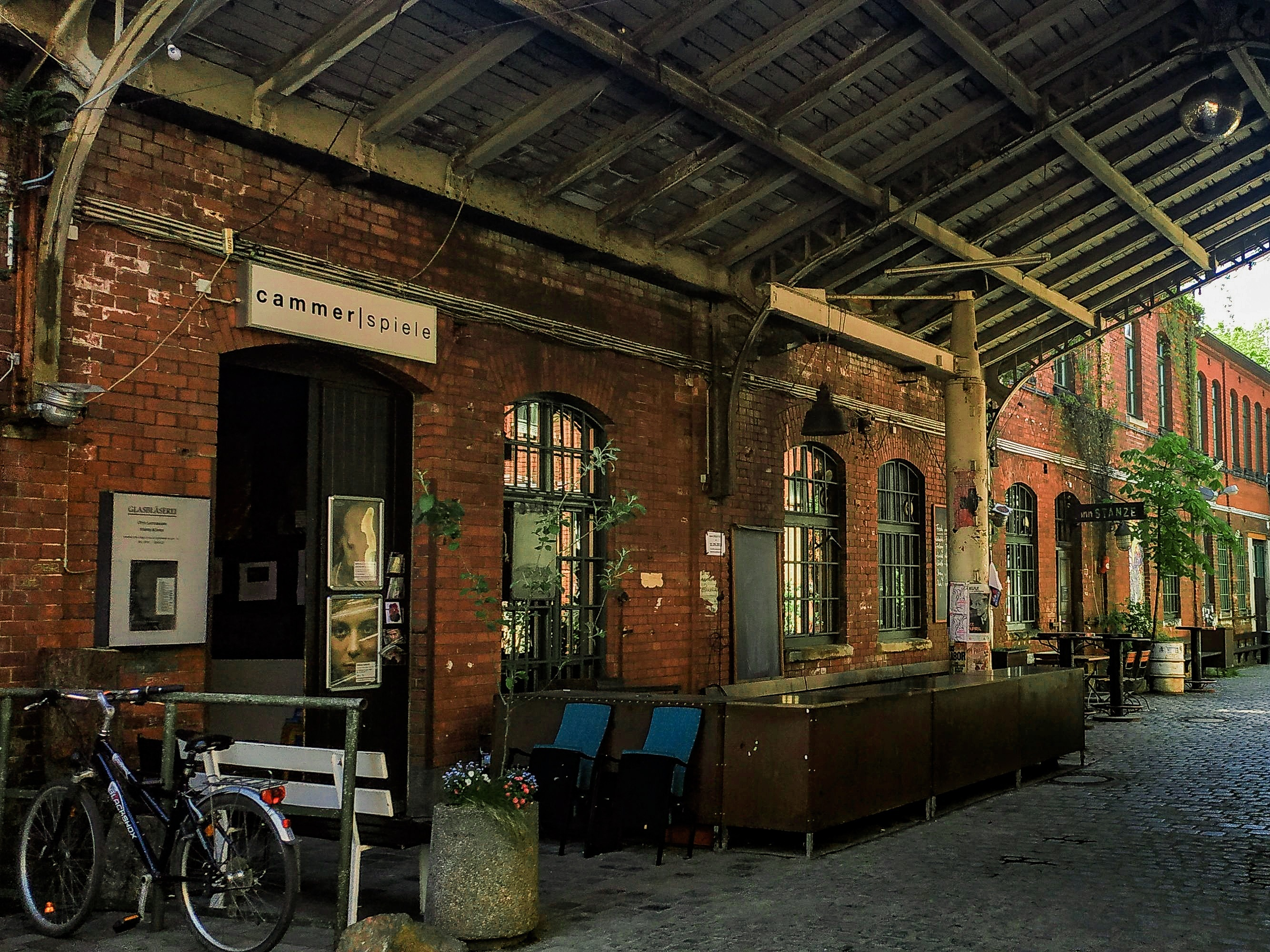 Foto des Eingangs zu den Cammerspielen Leipzig im April 2019